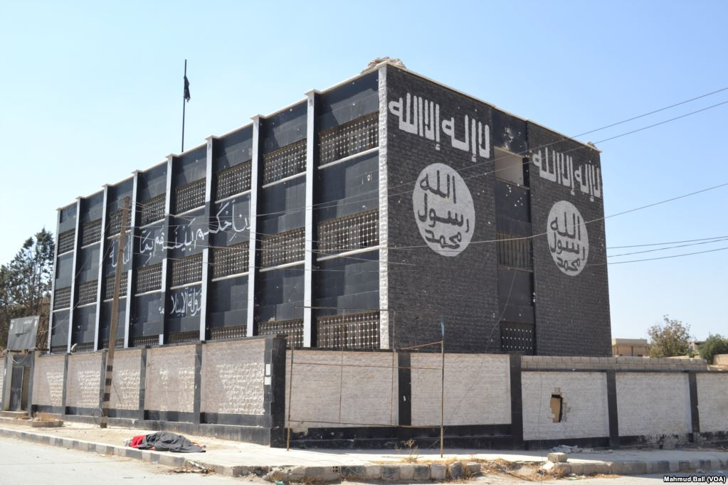 Manbij en août 2016, après sa prise par les Forces démocratiques syriennes.